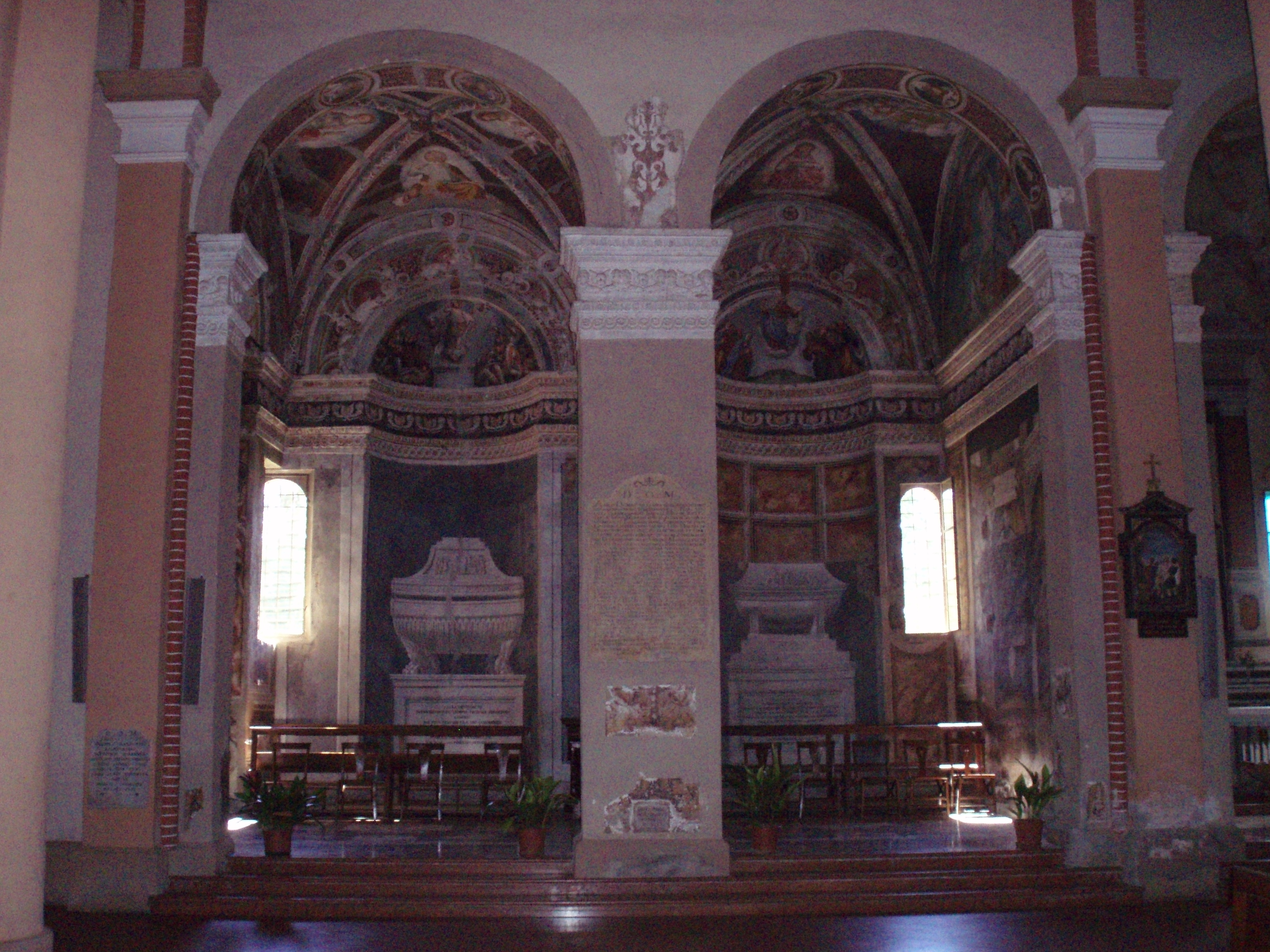 La cappella Pallavicini in San Francesco Chiesa dei francescani, Cortemaggiore decorazione realizzata da Giovanni Antonio Pordenone nel 1529-1530.